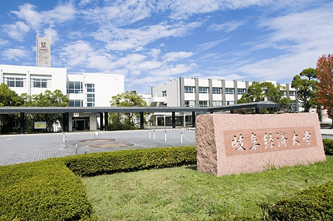 岐阜経済大学全景